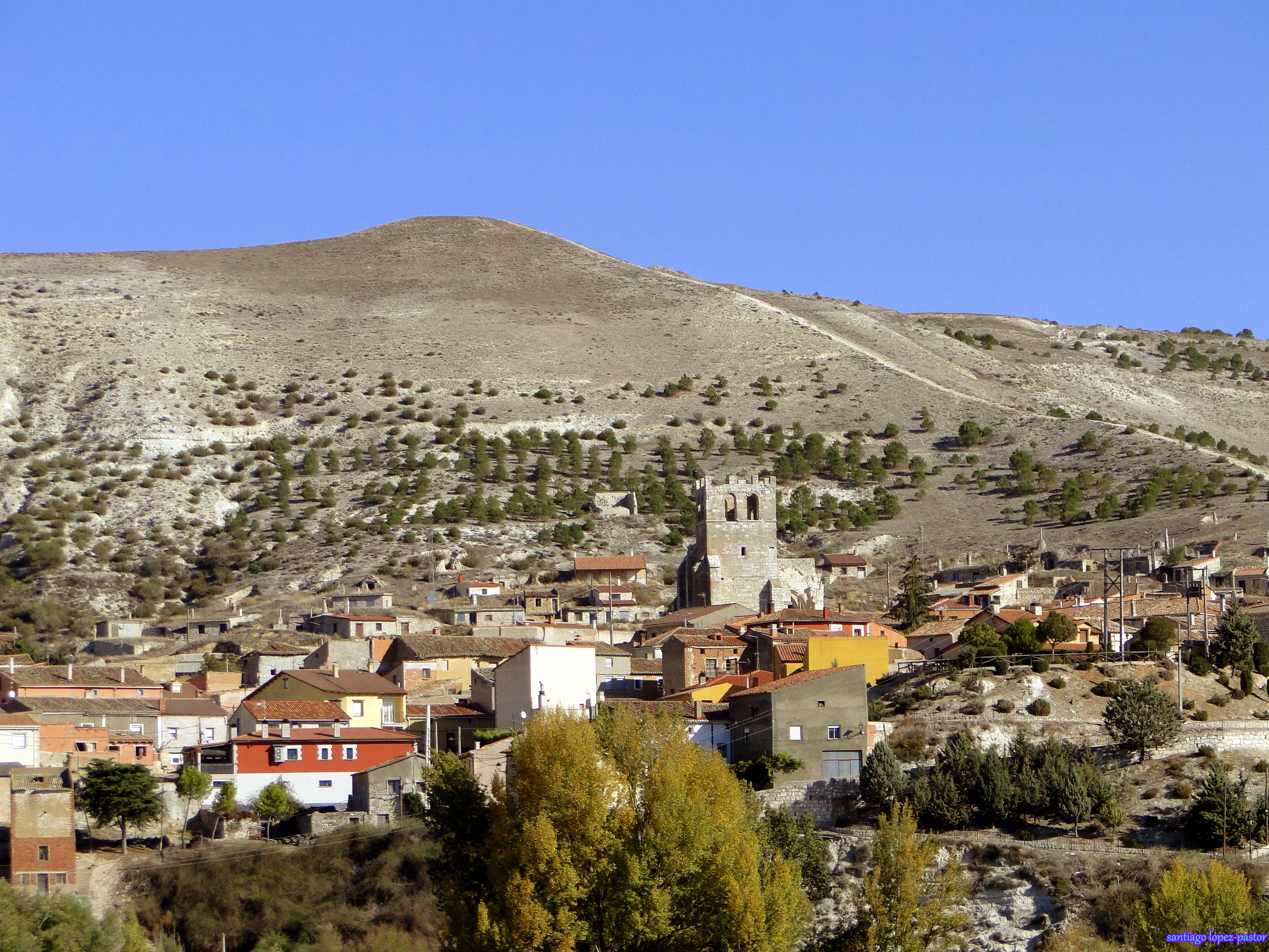 Palenzuela